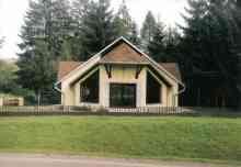 Dom nádeje Zdroj: Fotodokumentácia k obci Dátum: 24.01.2006 Autor: Stanislav Rajňák Povolenie: PD Iné verzie tohto súboru: Nie